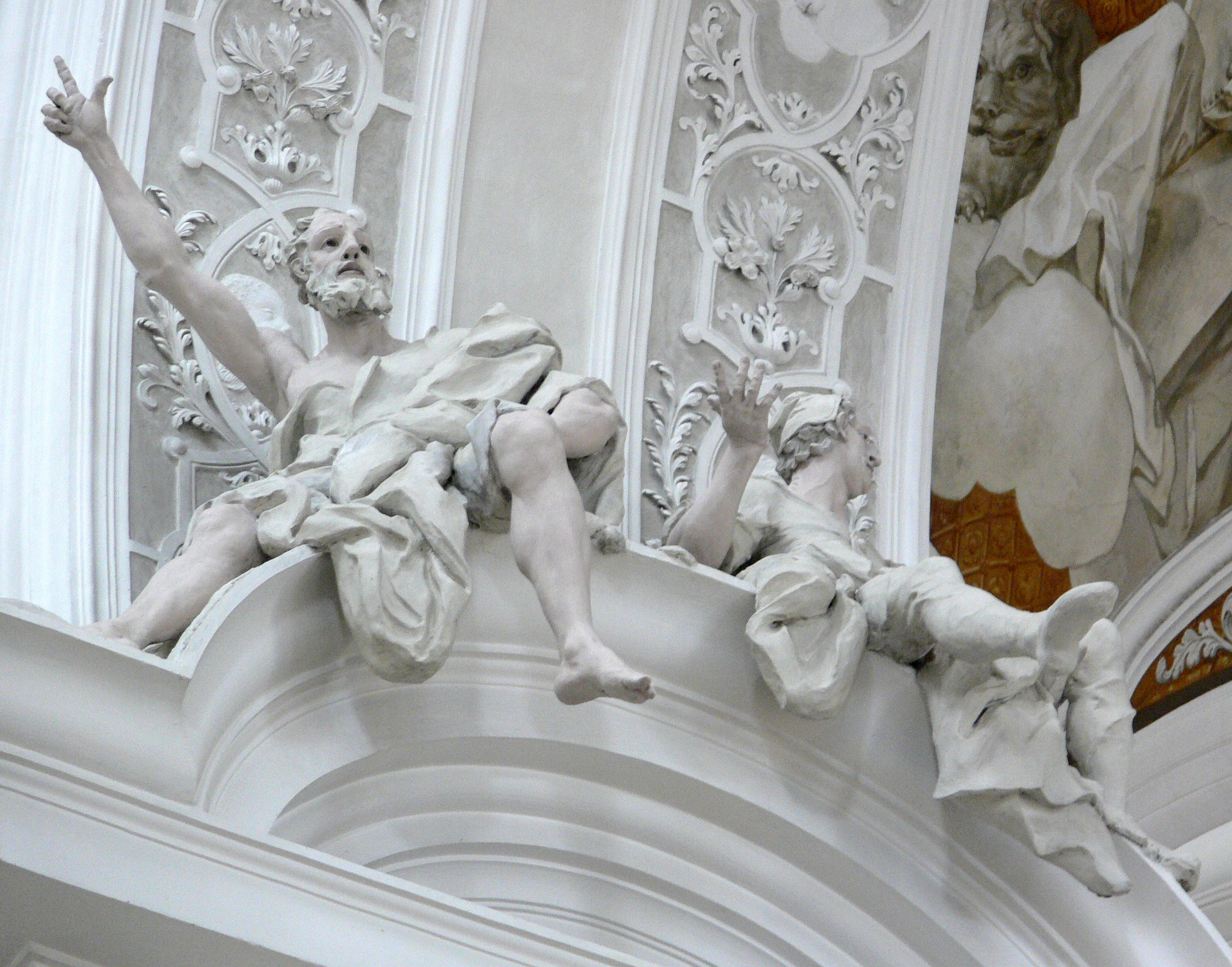 Weingarten (Württemberg), Basilika St. Martin und Oswald, Prophetenstatuen auf den Vierungspfeilern von Franz Anton Kuen, 1721 Jeremias (mit Kind) und Isaias (mit Säge, auf dem Photo nicht sichtbar)